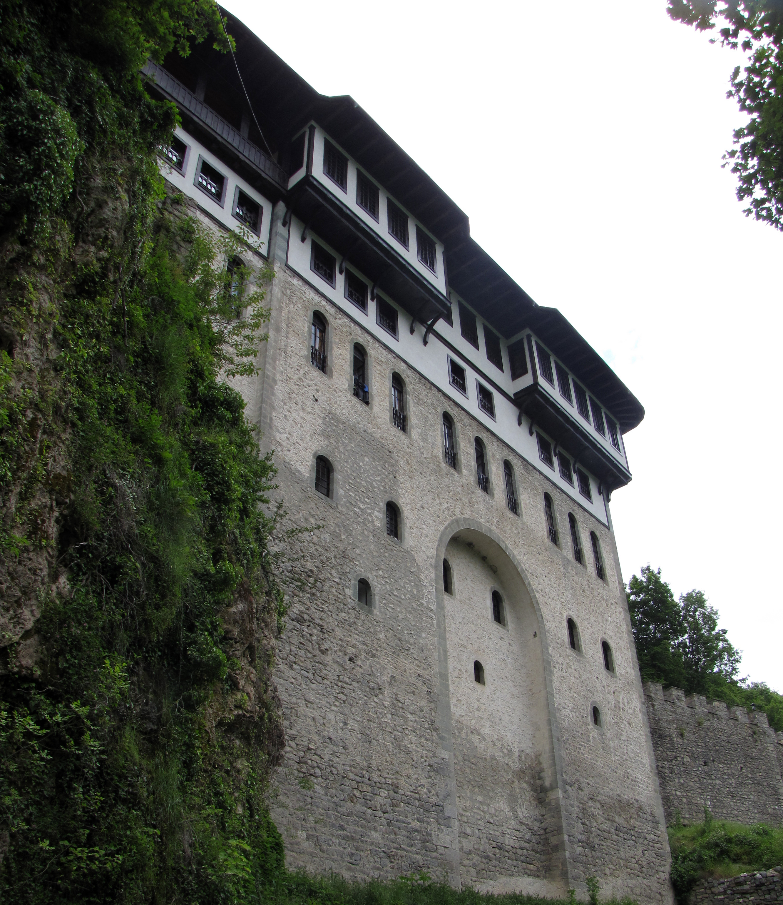 Поглед кон манастирот Св.Јован Бигорски